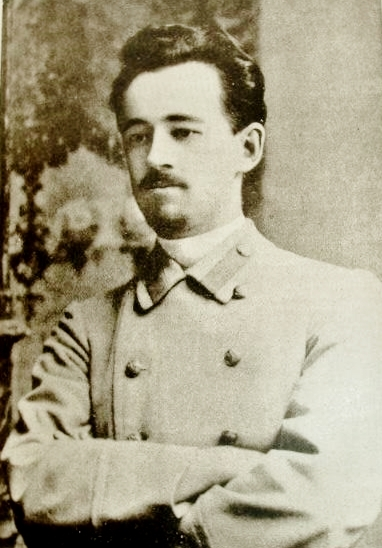 Egor Sergeevič Sozonov